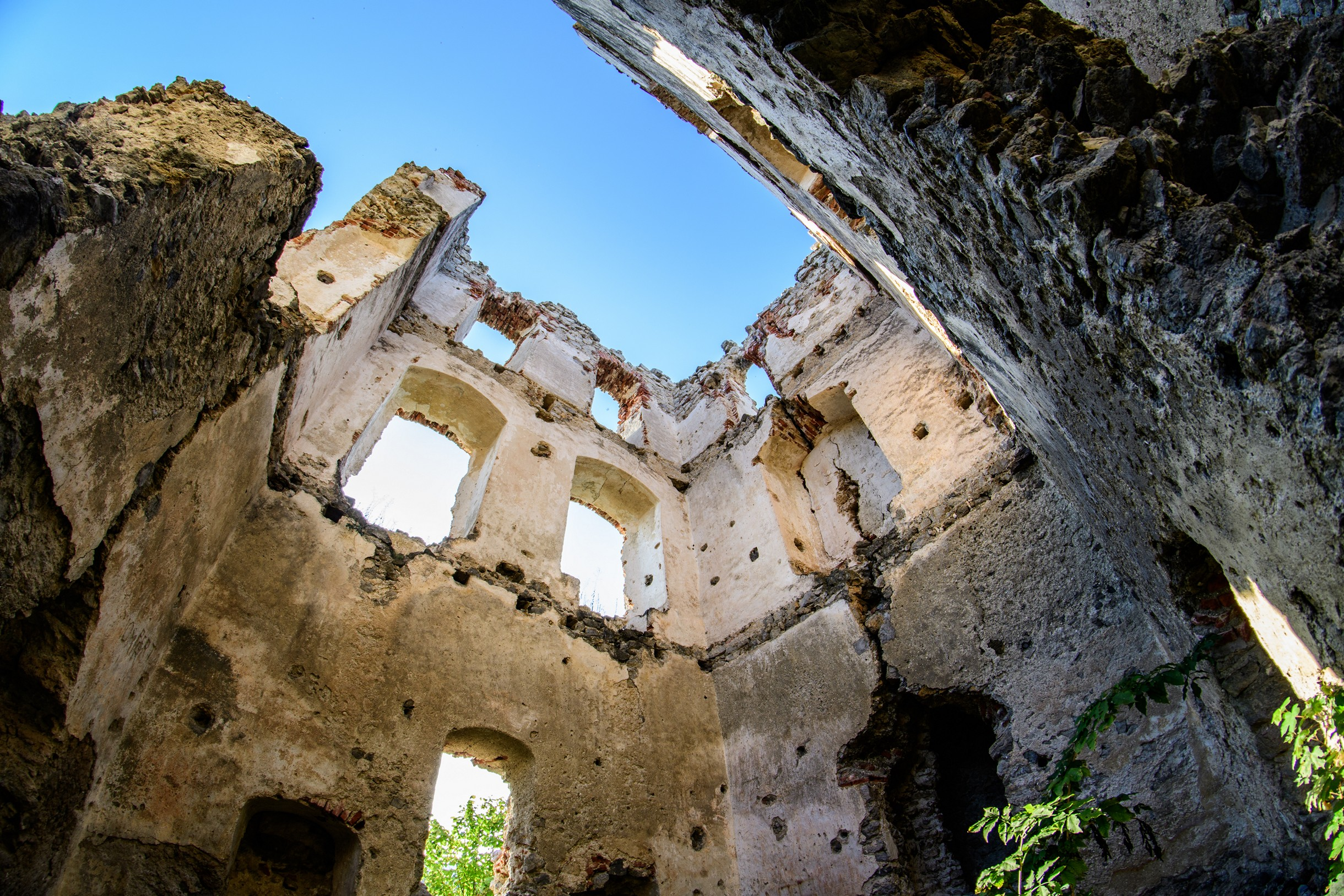 Grad "Ružica"